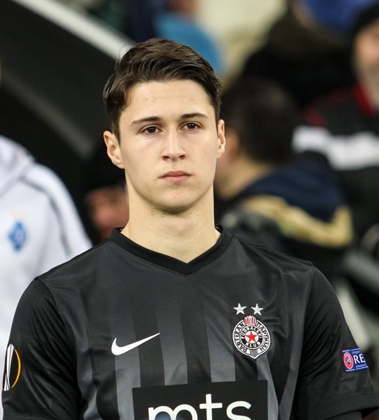 Danilo Pantić na utakmici protiv Dinama u Kijevu.